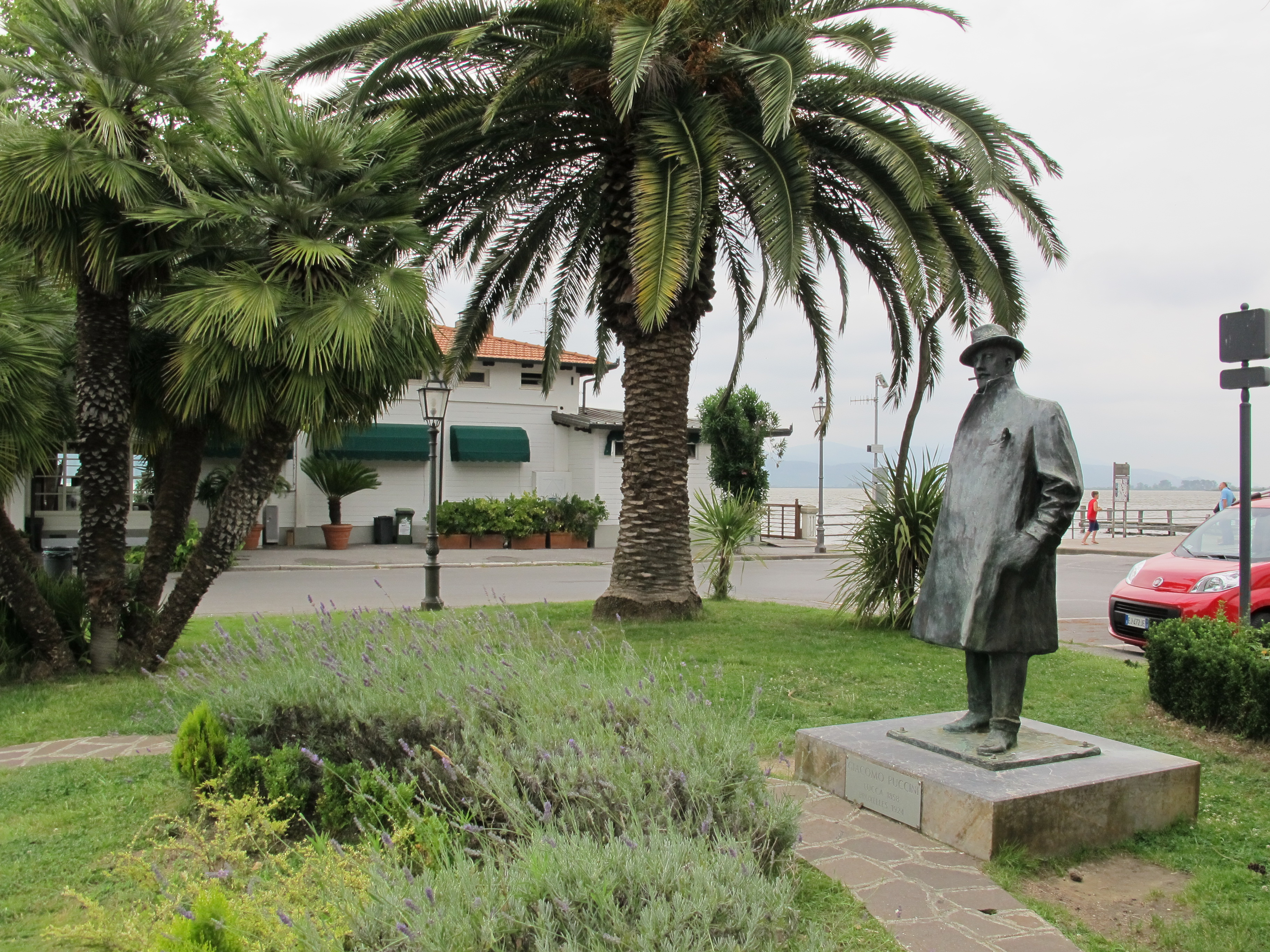 Denkmal Giacomo Puccini; In Front des Lago di Massaciuccoli, Torre del Lago Puccini, Viareggio (LU) – Ein Bronzedenkmal für Giacomo Puccini von 1925 vom italienischen Bildhauer russischer Herkunft Fürst Paolo Troubetzkoy (1866-1938). Er entstammte dem russischen Fürstenhaus Trubezkoi.